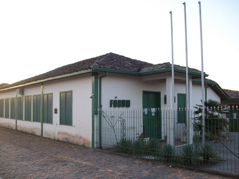 Fórum do município de Campina Grande do Sul (Grande Curitiba), PR, Sul do Brasil.